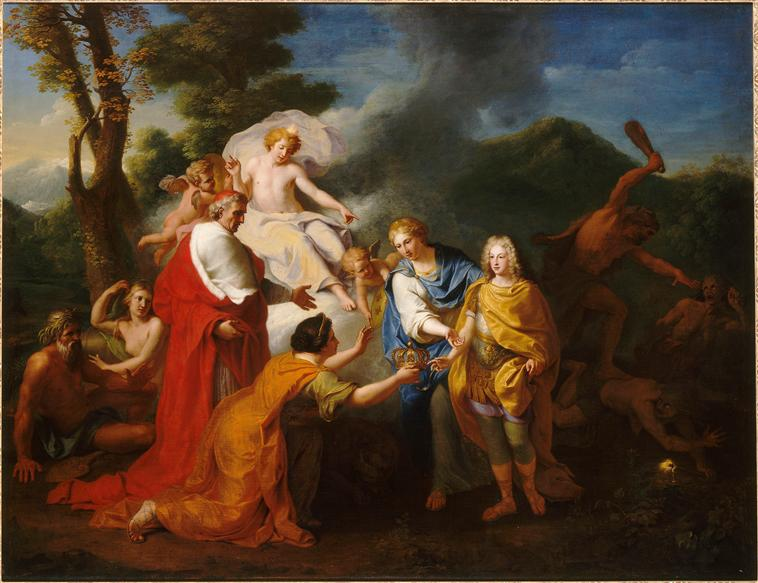 Allégorie de la reconnaissance du duc d'Anjou comme roi d'Espagne, novembre 1700